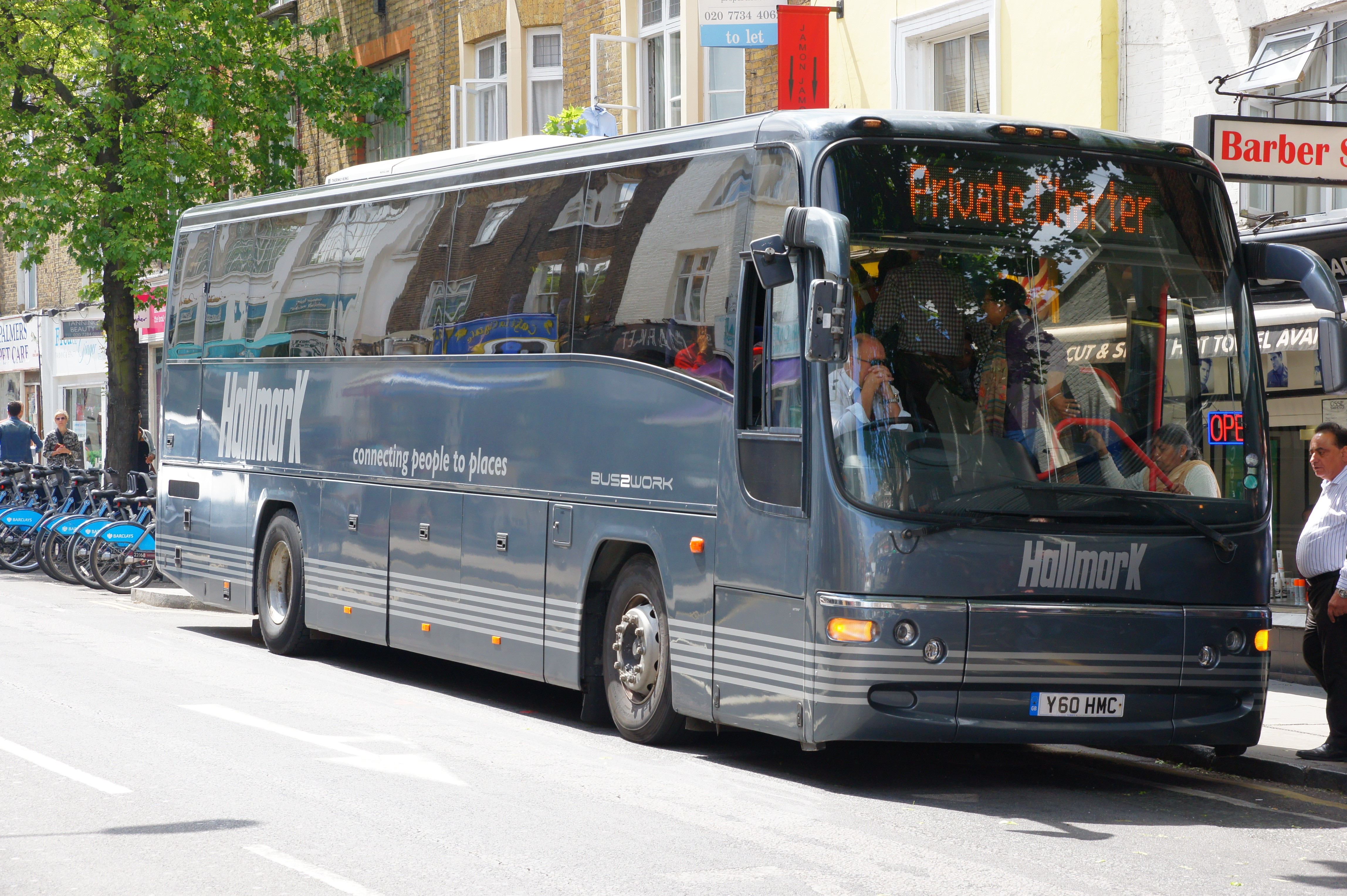 Y660HMC 080613 CPS